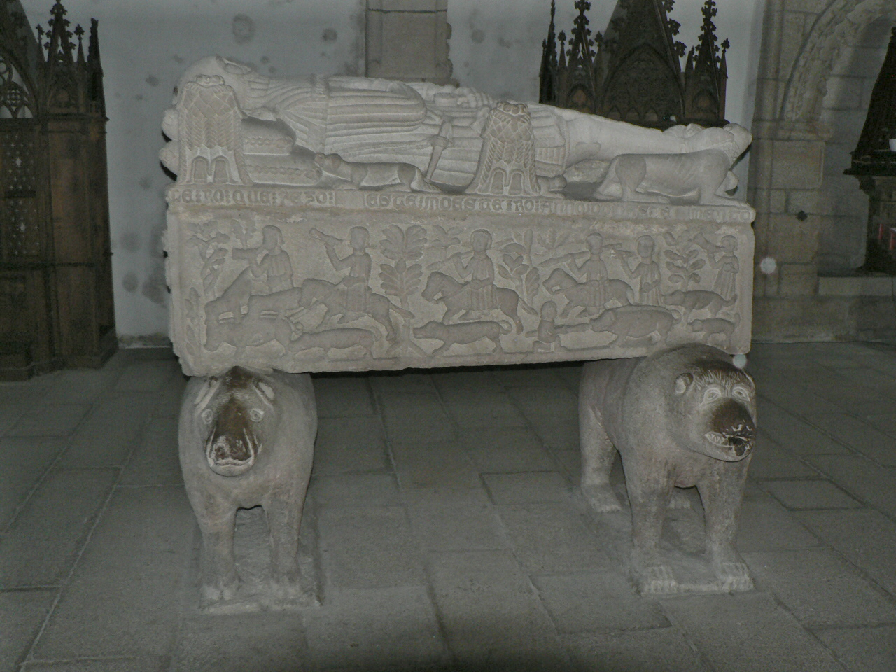 Igrexas de Betanzos: Sarcófago de Fernàn Pérez de Andrade, igrexa de San Francisco.